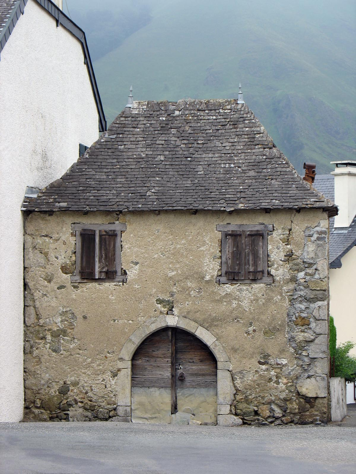 Une maison ancienne à Larrau. (Pyrénées-Atlantiques) Auteur: Monster1000 France juillet 2006